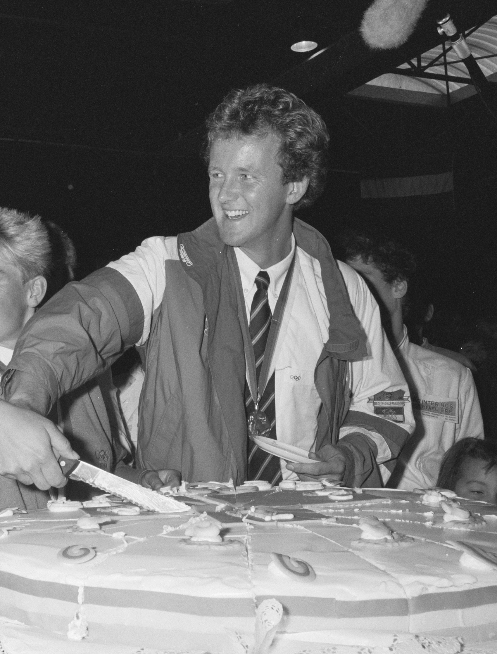 Nico Rienks